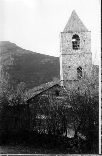 Église et presbytère de Douch (commune de Rosis, département de l'Hérault) autour desquels eurent lieu les combat de septembre 1943